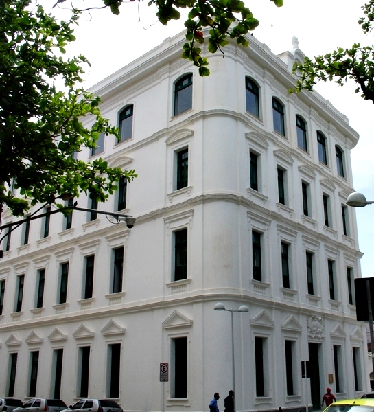 Inaugurado em 07/02/2014, Recife, Brasil.